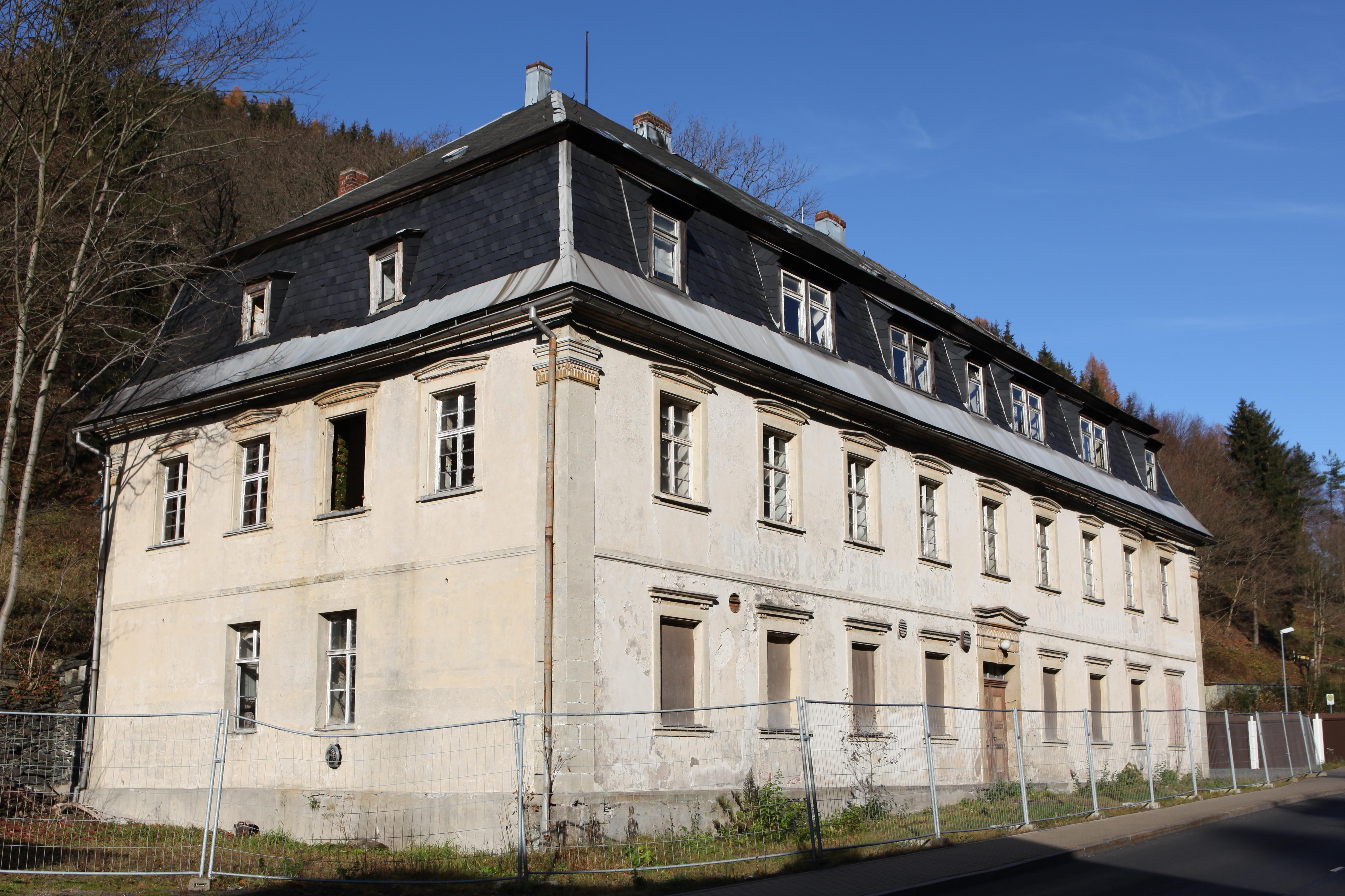 Ehemalige Wiesleinsmühle, 1824, Lauscha, Bahnhofstraße 110